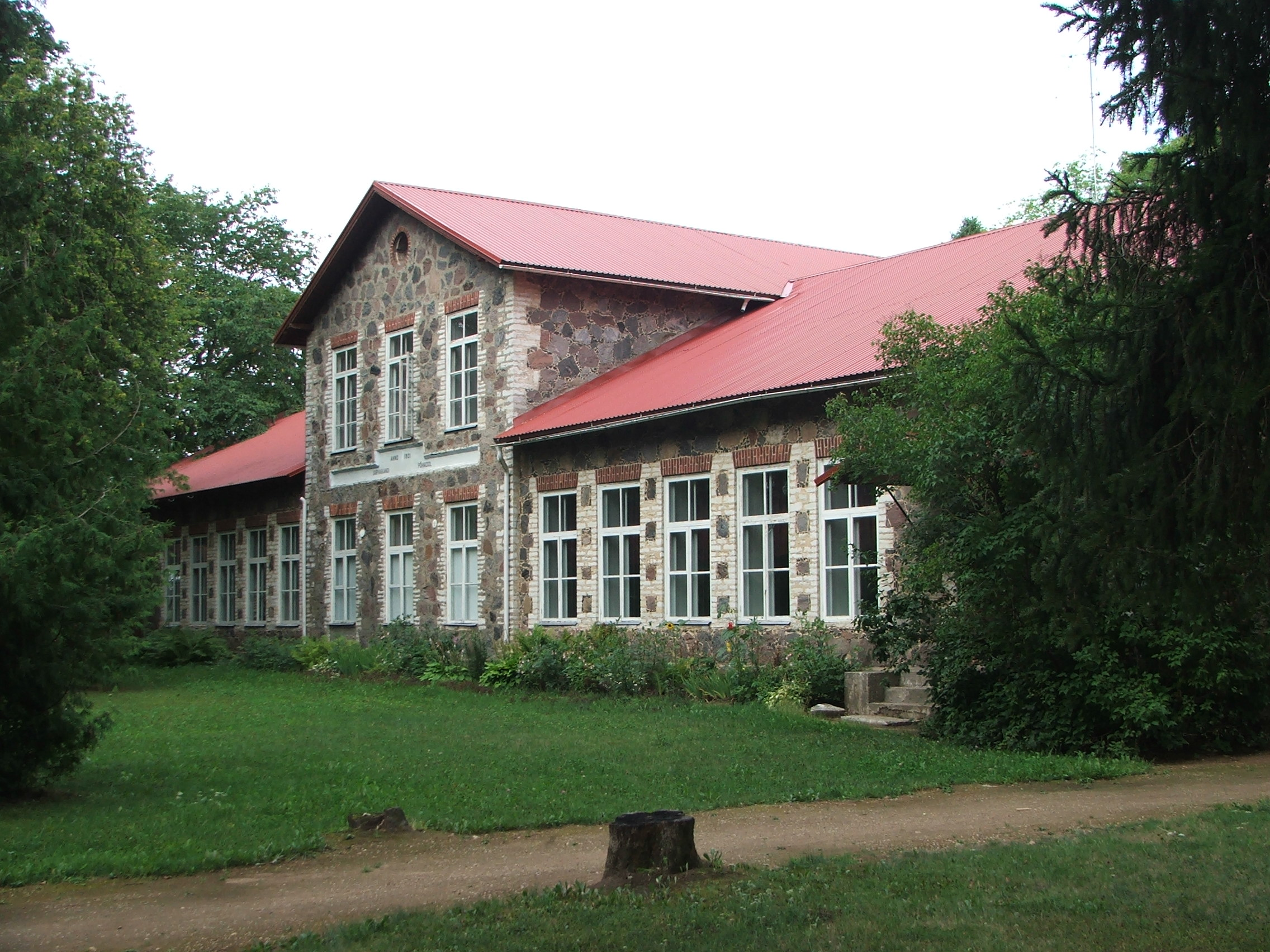 Purku lasteaed-algkool